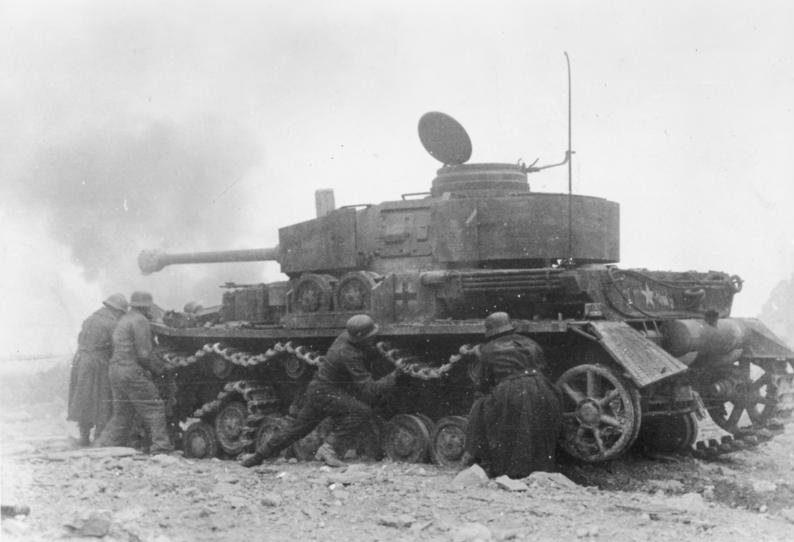 Scherl: Panzer im Kampf um Casino Obwohl der Feind den beschädigten Panzer erkannt hat und mit Granatwaffen schiesst, arbeitet die Besatzung fieberhaft, um ihren Panzer wieder flott zu machen, ohne Rücksicht auf die Splitter, die ihnen dabei um die Ohren sausen. Die Leistung der Panzermänner ist umso höher anzuerkennen, als ja jegliche Bewegungen in dem Trümmerfeld von Cassino während des Tages kaum möglich sind, vielmehr jegliches Instellunggehen und jegliche Versorgung der Truppe im Schutz der Dunkelheit geschehen muss. PK-Bildberichter Enz (Scherl)